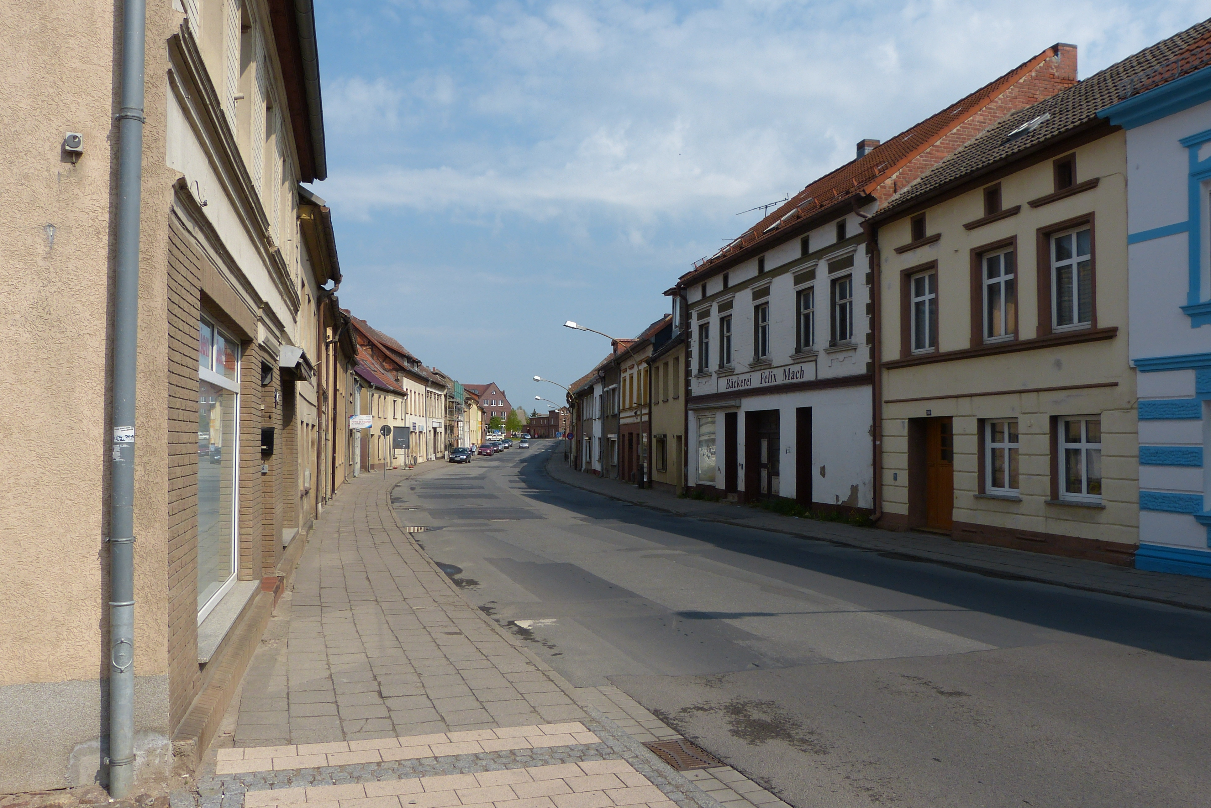 Loitz, Greifswalder Straße